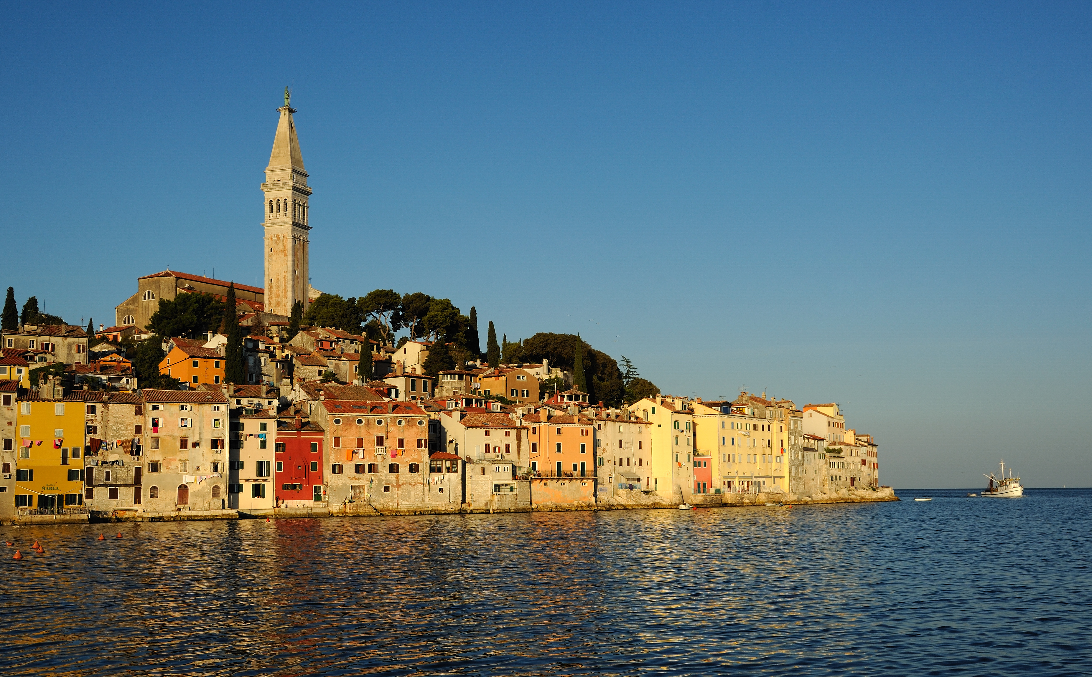 Rovinj, Croatia.